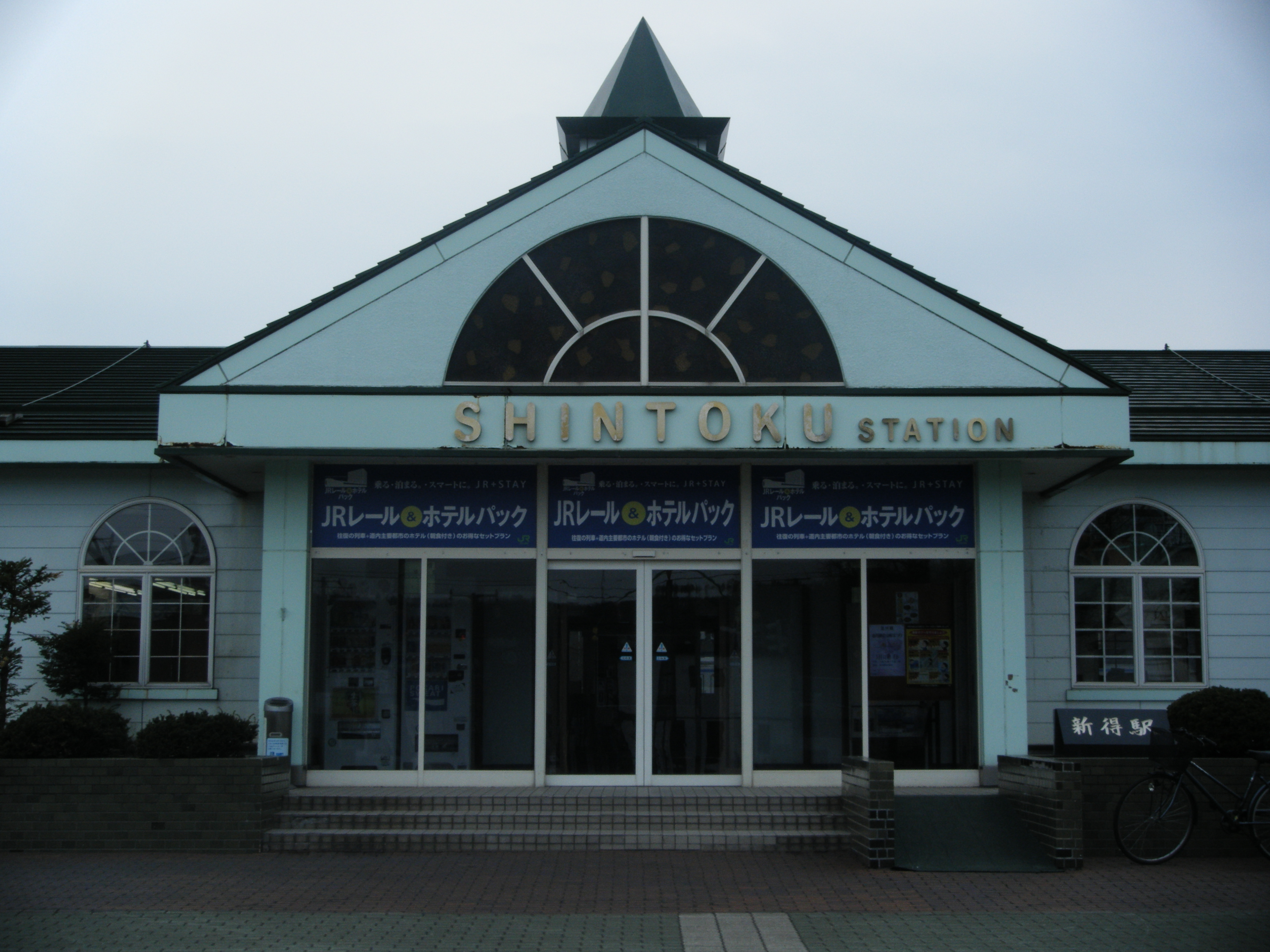 JR北海道 根室本線・石勝線 新得駅駅舎